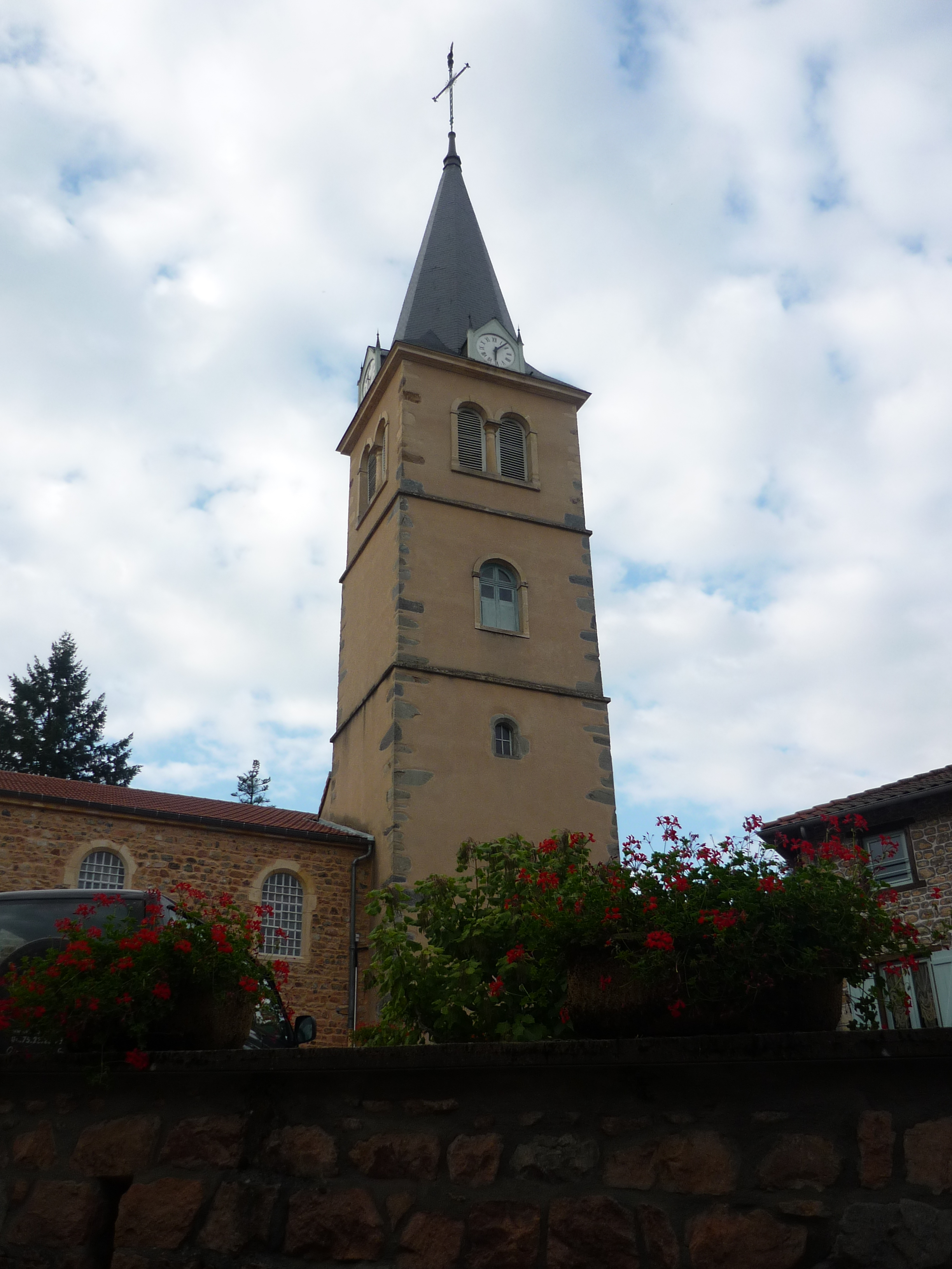 Église de Claveisolles, dans le département du Rhône